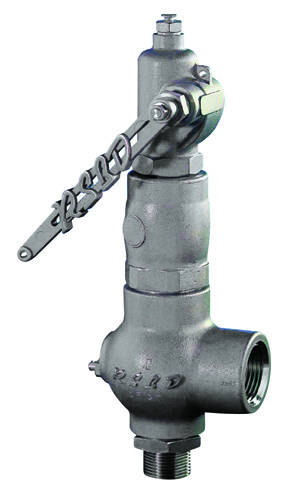 Soupape de sûreté et de décharge Gamme Sarasin-RSBD - série 9